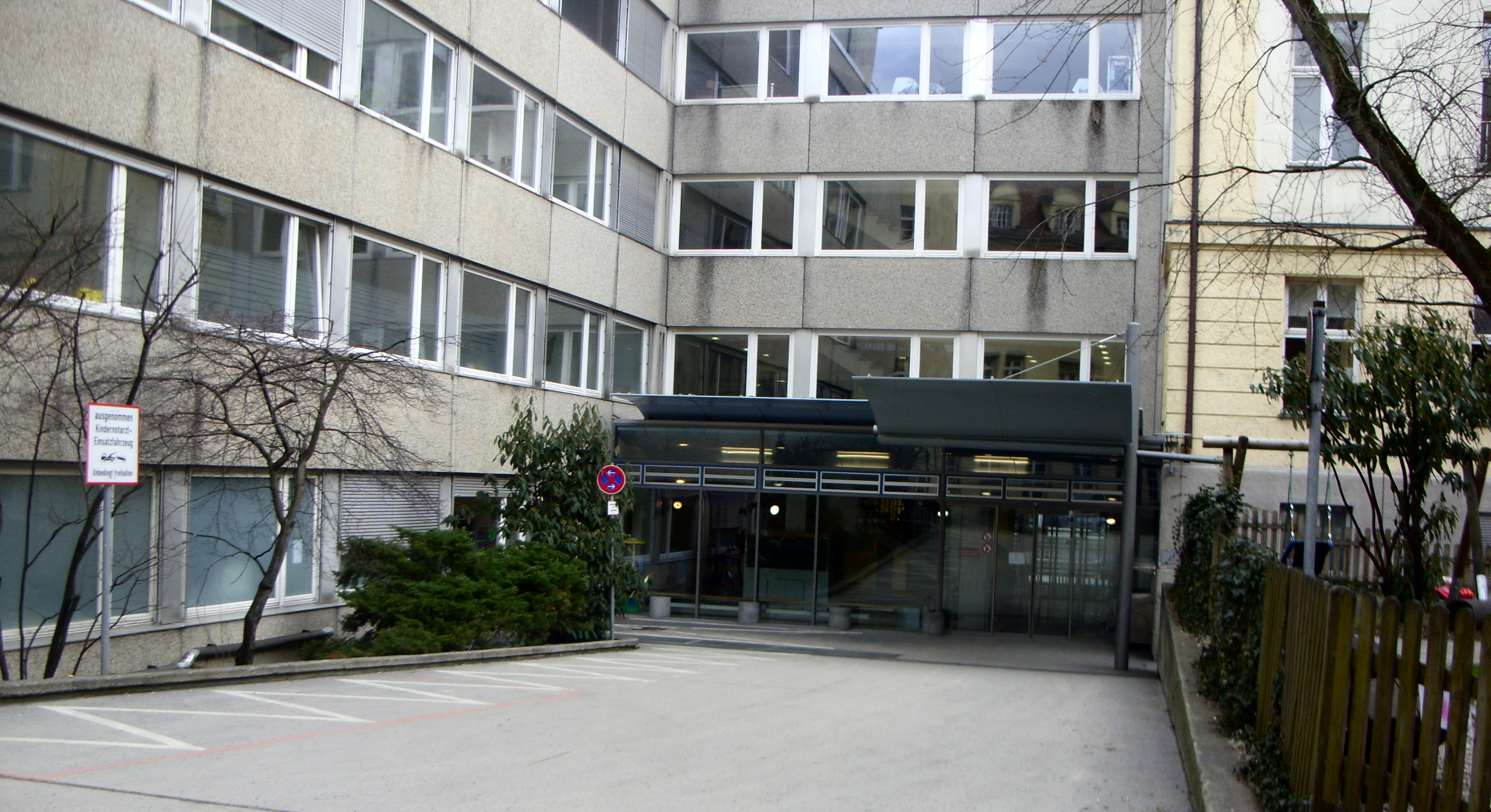 Notaufnahme/Zufahrt für Notarzt am Dr. von Haunerschen Kinderspital in München